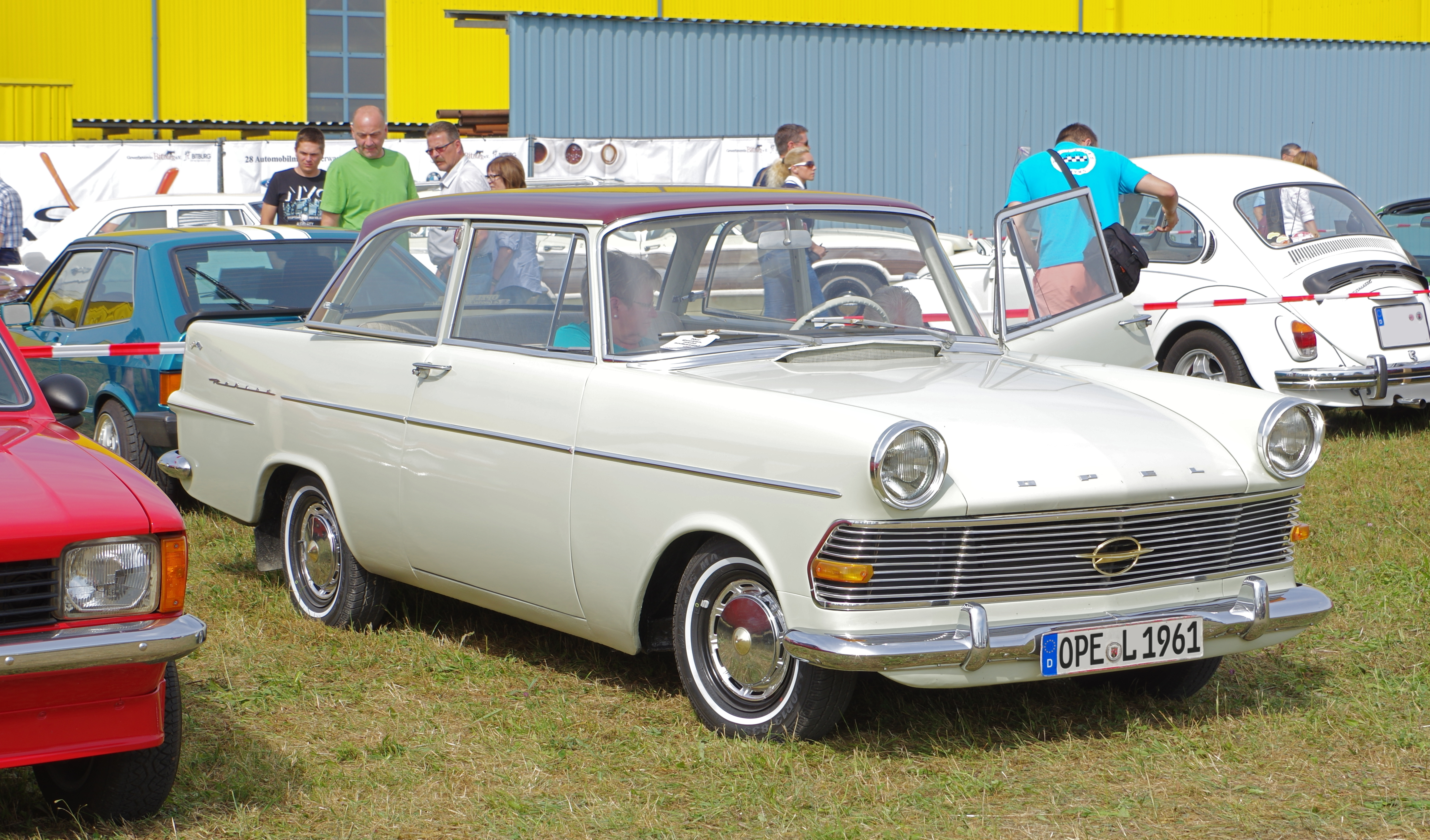 Opel Rekord P2, 1961, 1700 cm³, 55 PS, , Bitburg Classic 2016, Das Nummernschild ist verfälscht!